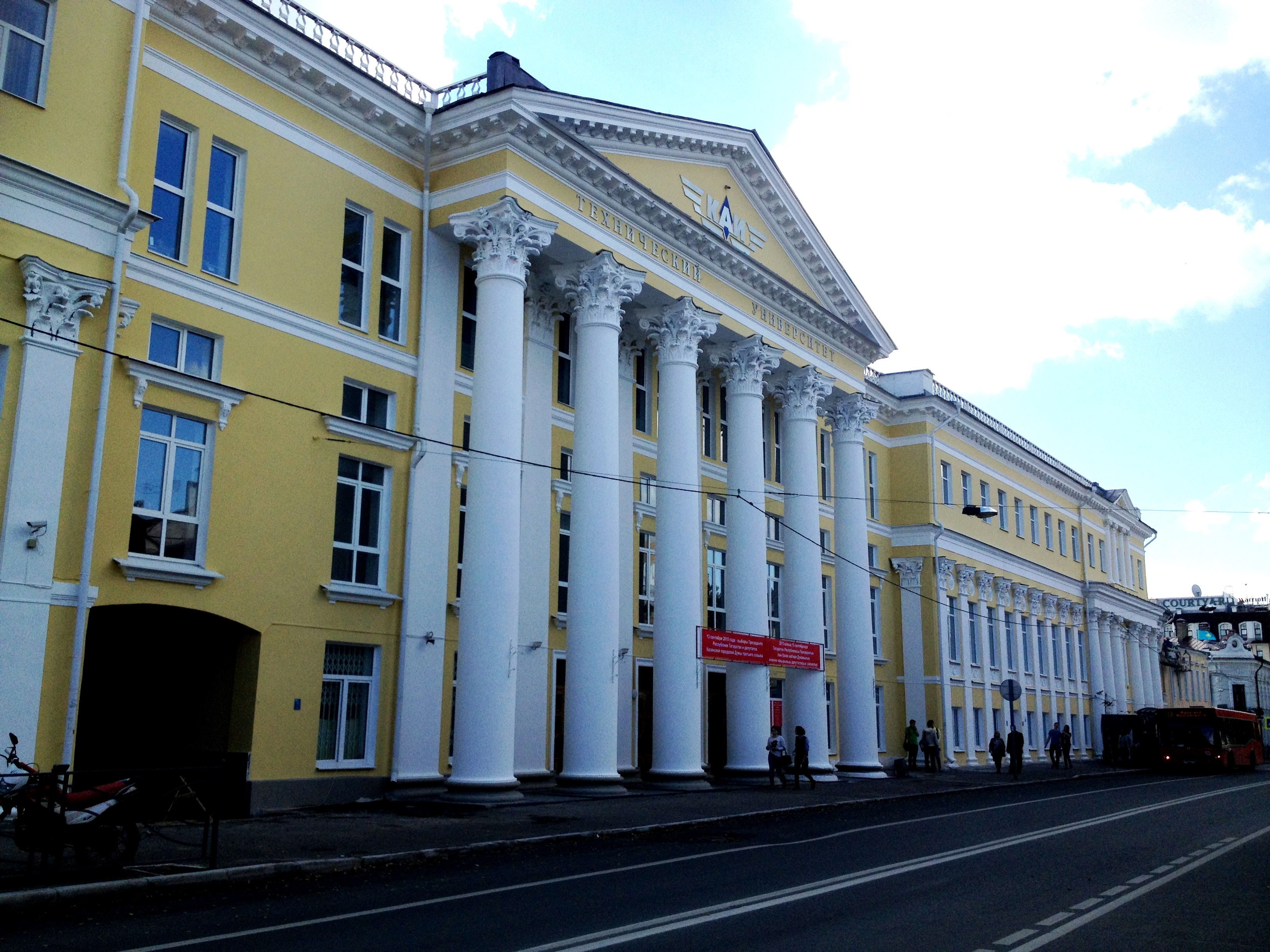 Здание 1-ой мужской гимназии; здесь учились художник И.И. Шишкин и один из первых русских марксистов Н.Е. Федосеев: улица Карла Маркса, 10, Казань, Татарстан